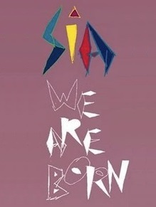 Logotipo del álbum "We Are Born"